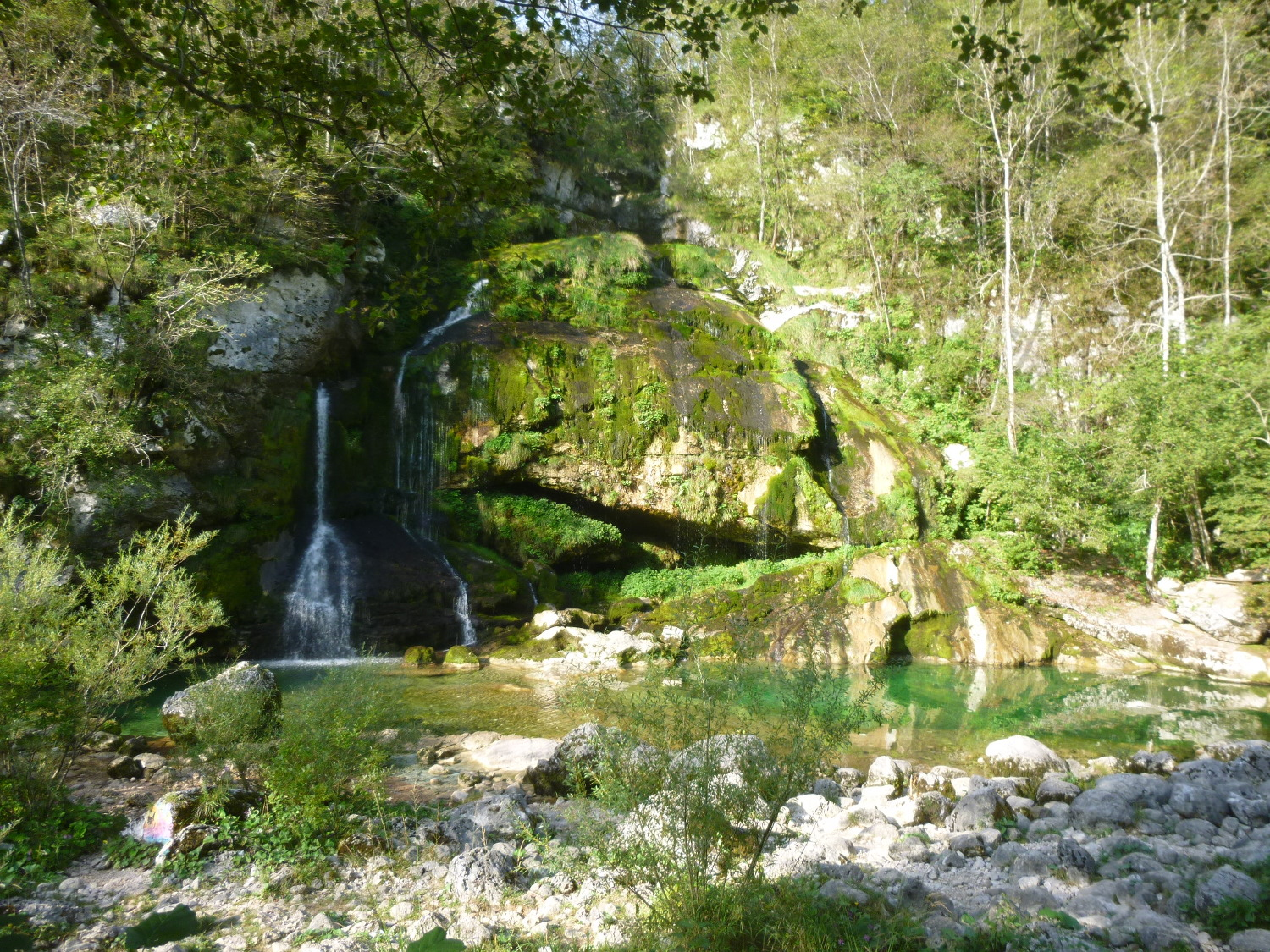 05 Slap Virje